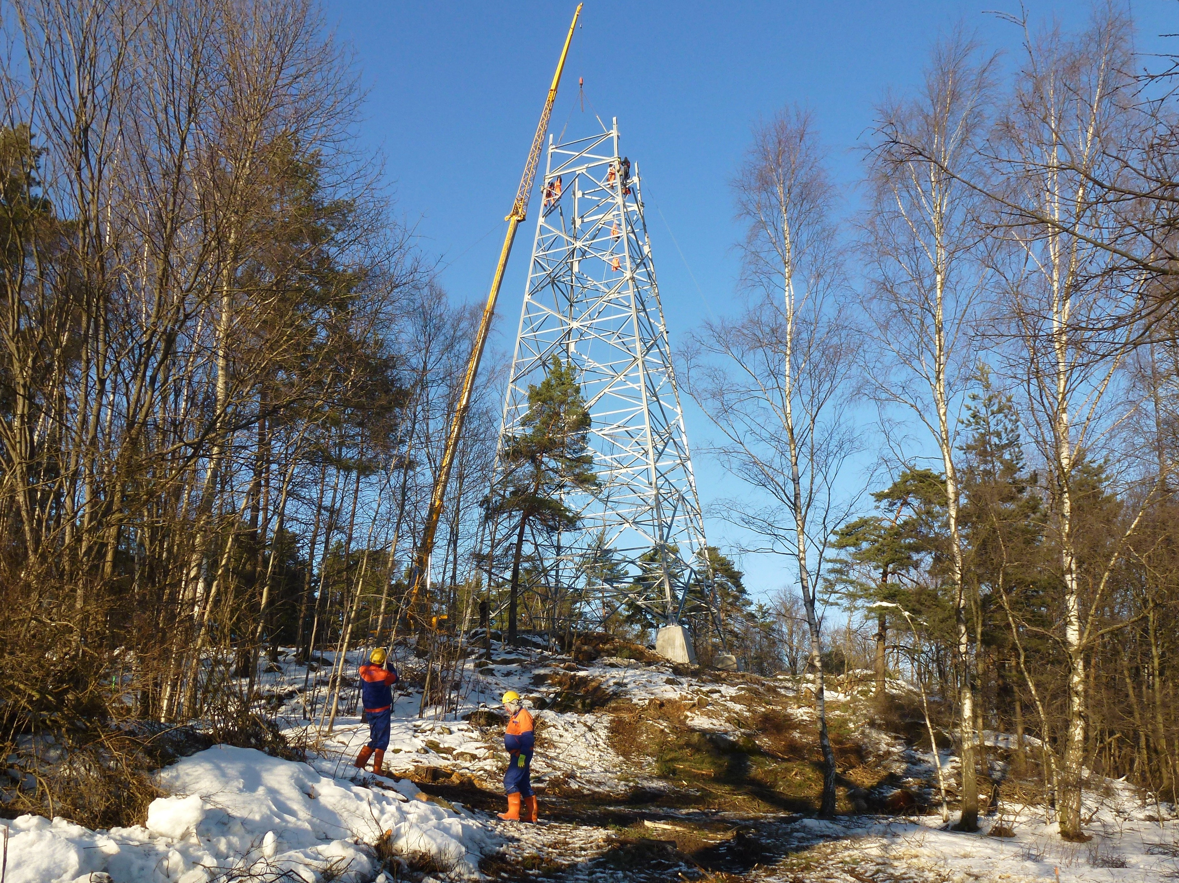 Flyttning av kraftledning vid Lindvreten för Förbifart Stockholm